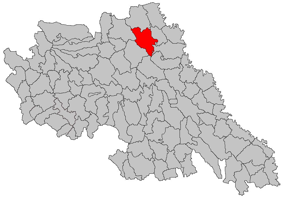 Categorie:Hărţi ale judeţului Iaşi